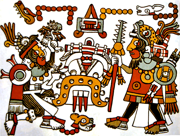 8 Venado Garra de Jaguar, Unificador de la Mixteca, recibe la visita de 4 Jaguar